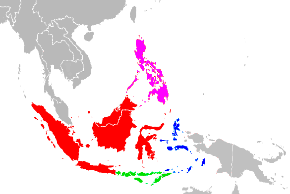 Mapa da Insulíndia